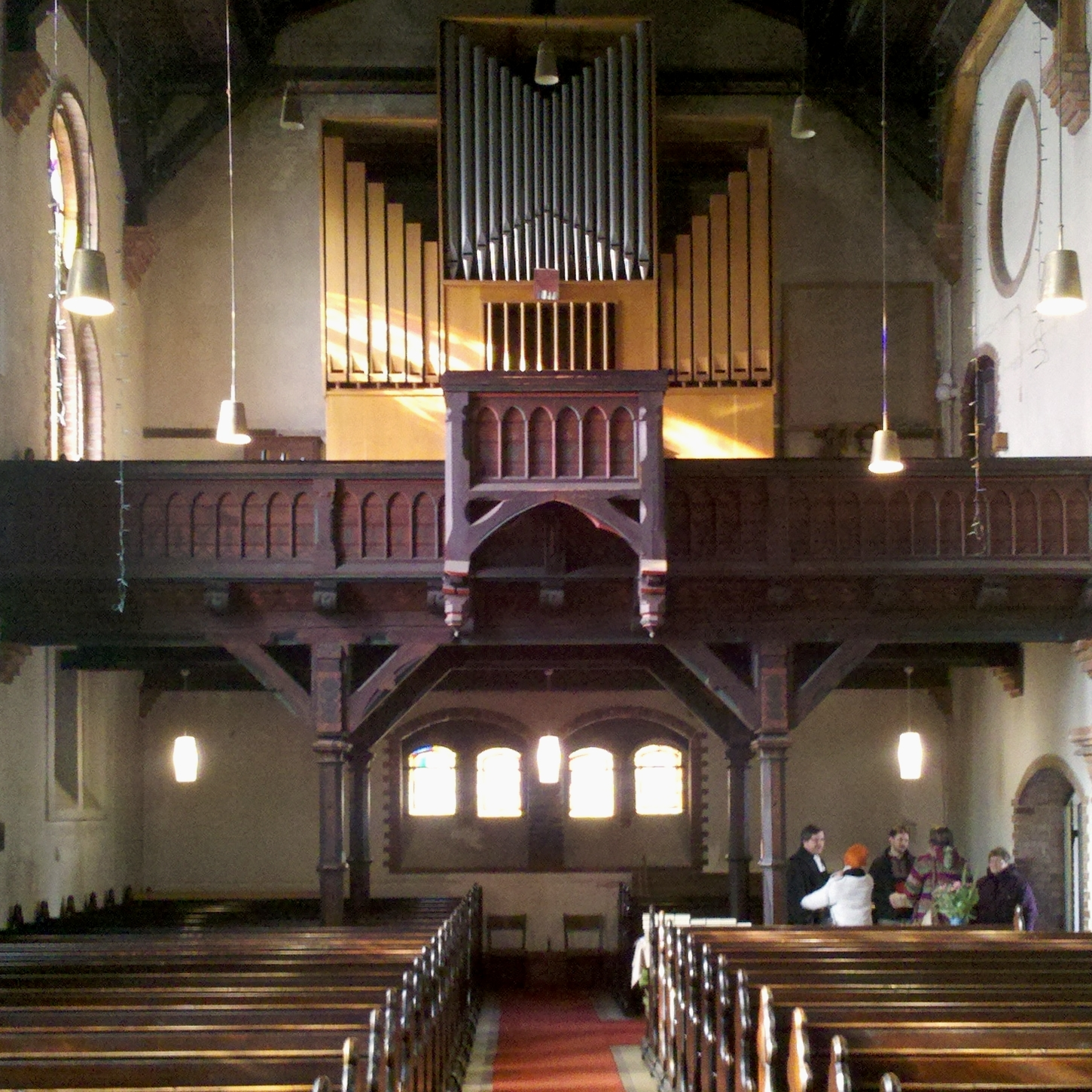 Johanniskirche Eberswalde: Westempore mit Eule-Orgel